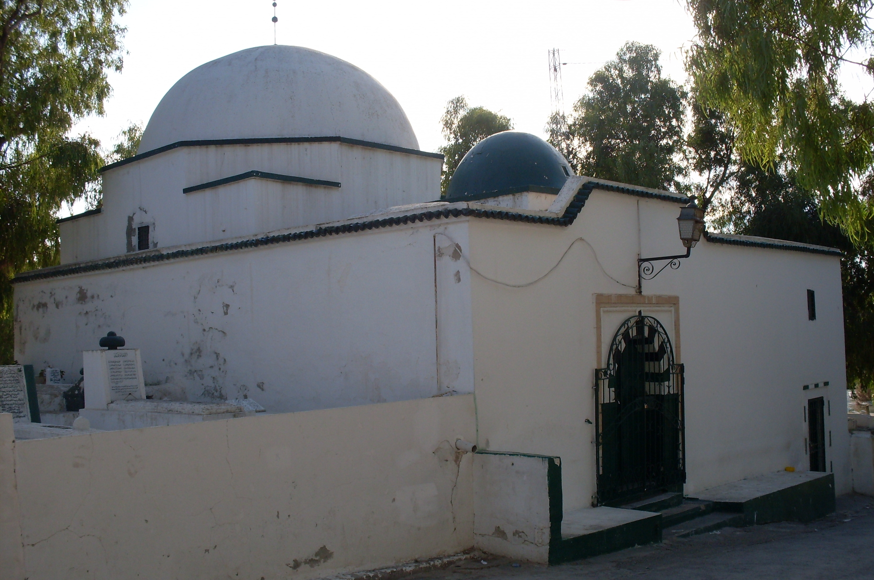 Mausolée Sidi Bechir Cimetière Dellaz